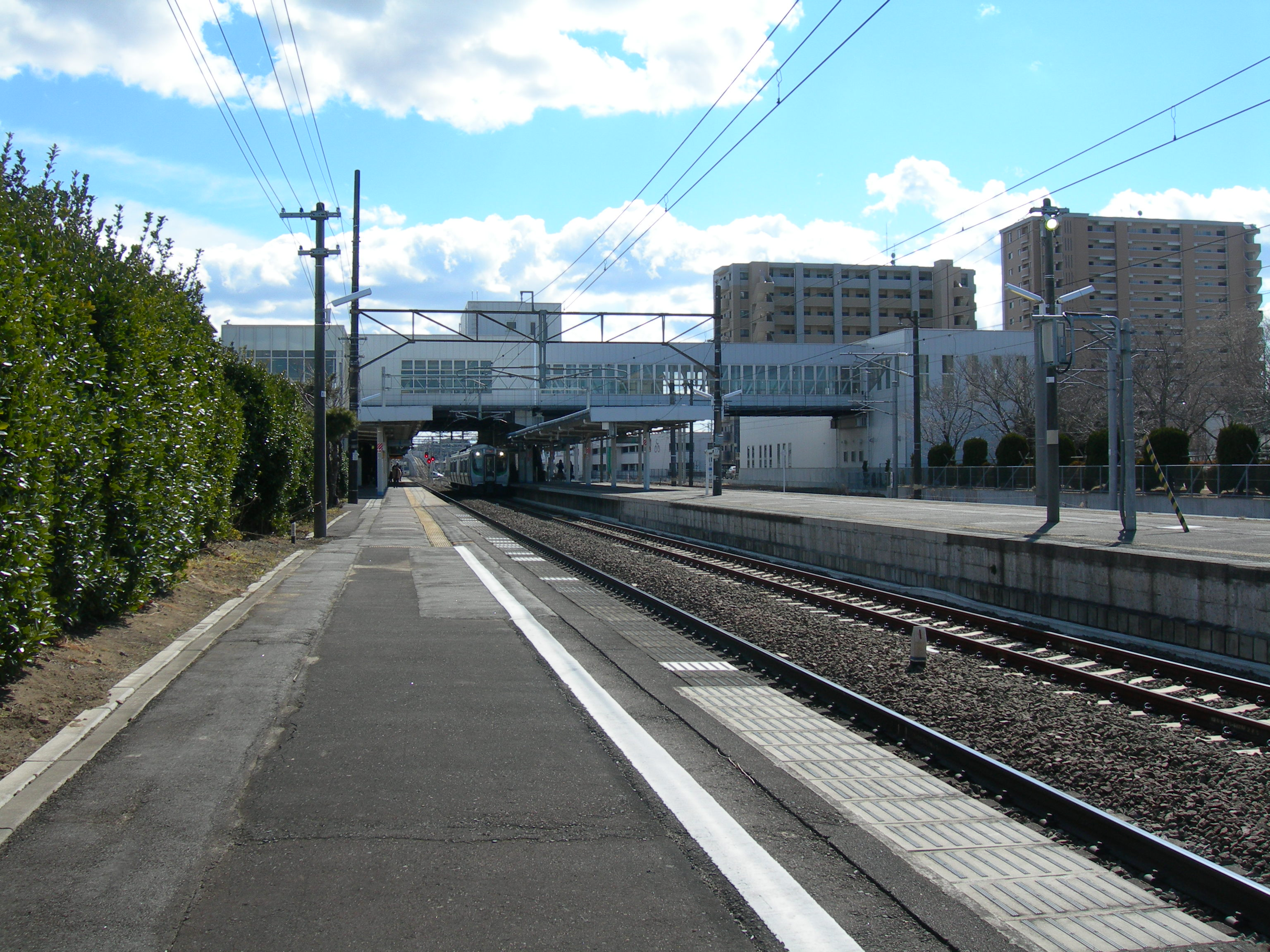 名取駅ホーム